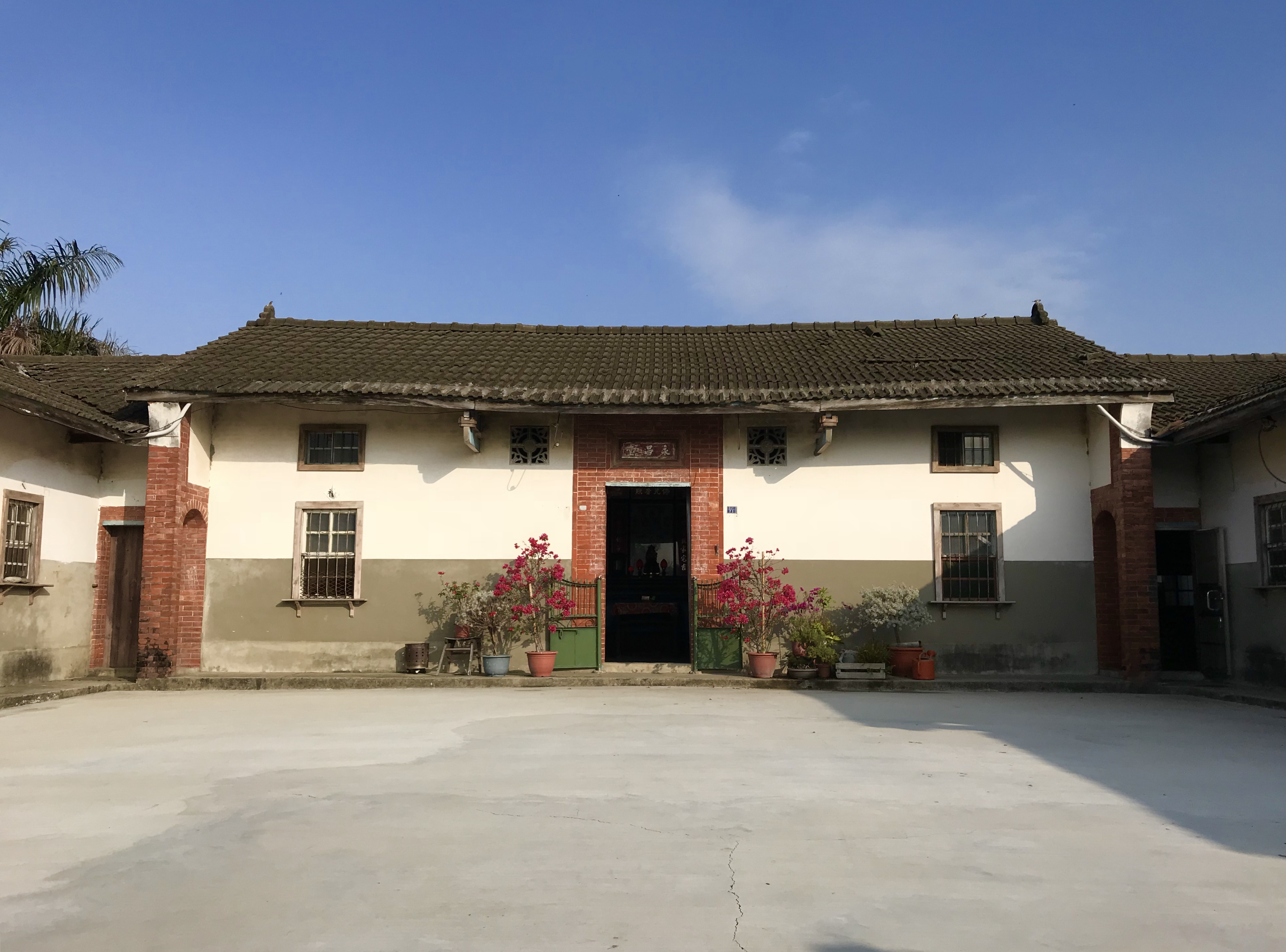 花甲男孩轉大人場景之一台中市烏日區九德里某古厝